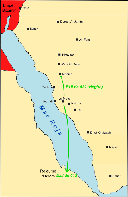 Exils musulmans de La Mèca de 615 e de 622.